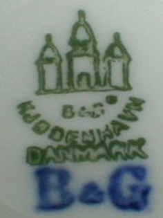 Marke (Signatur) der ehemaligenPorzellanfabrik B&G in Kopenhagen